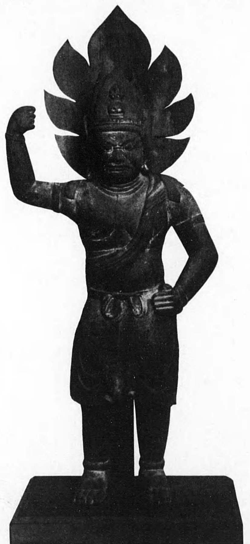 鳥取県東伯郡三朝町・三仏寺所蔵の木造蔵王権現立像6体のうち第6号（重要文化財）。平安時代の作。もと奥院（投入堂）安置。